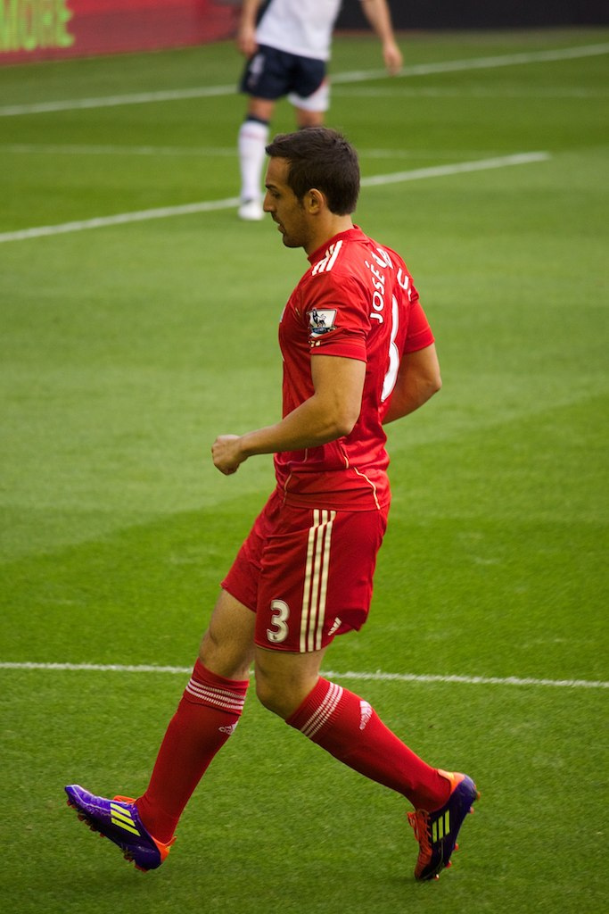 Liverpool vs Bolton 27/08/2011